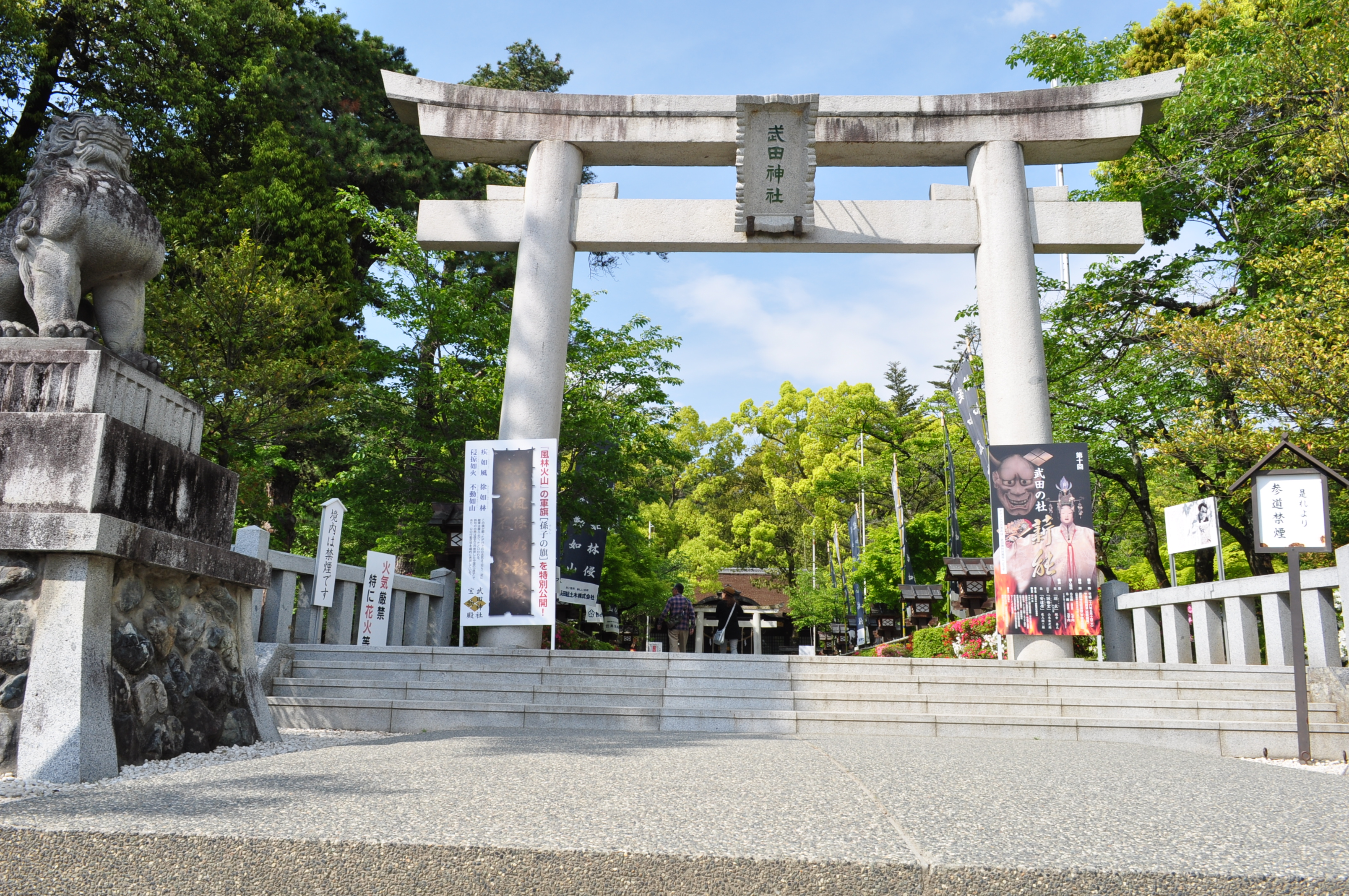 2014年（平成26年）5月8日、参道の一之鳥居